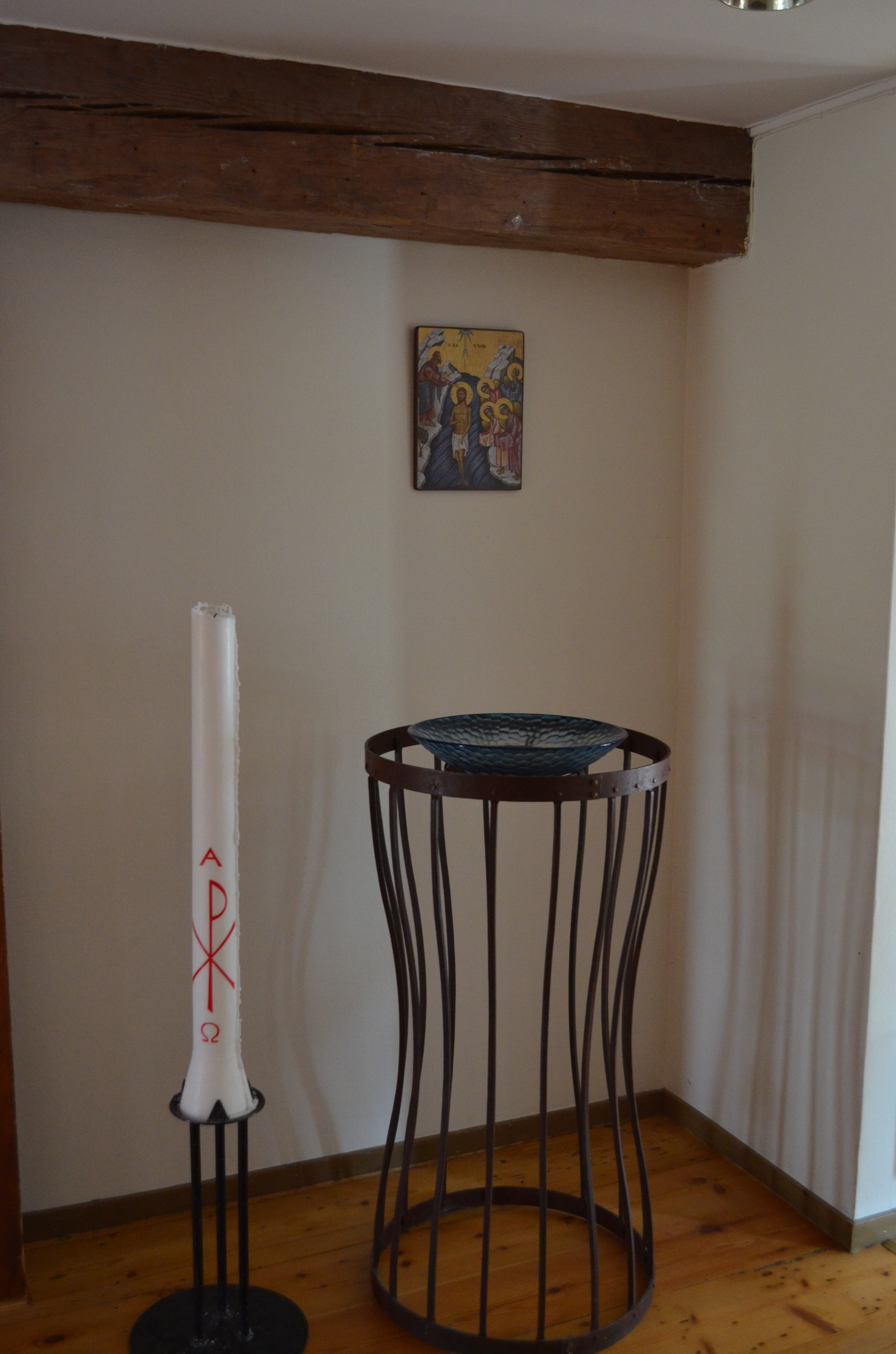 Dopfunten.